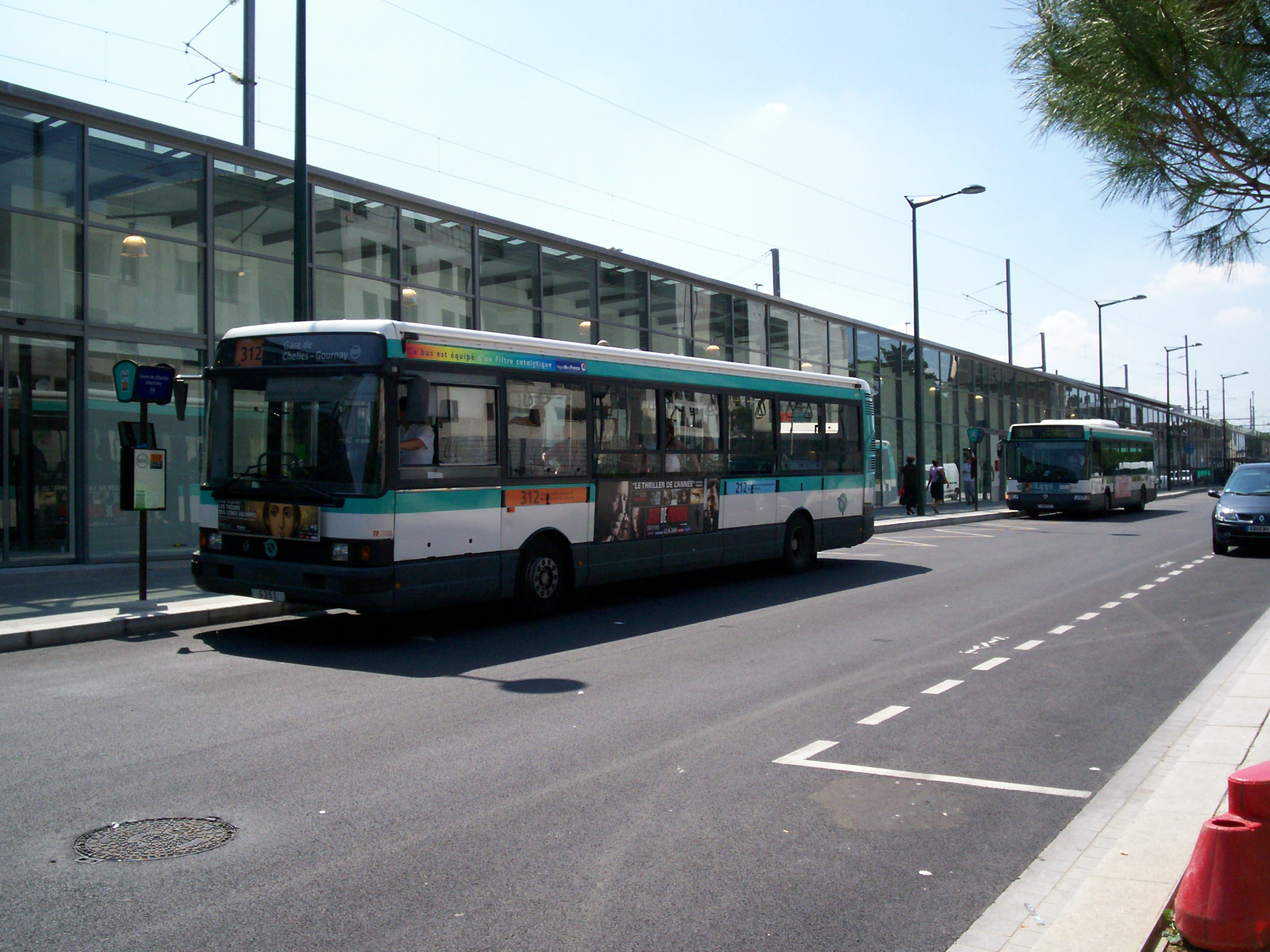 Bus 312 et 213 au terminus de la gare de Chelles sur la nouvelle allée des transports